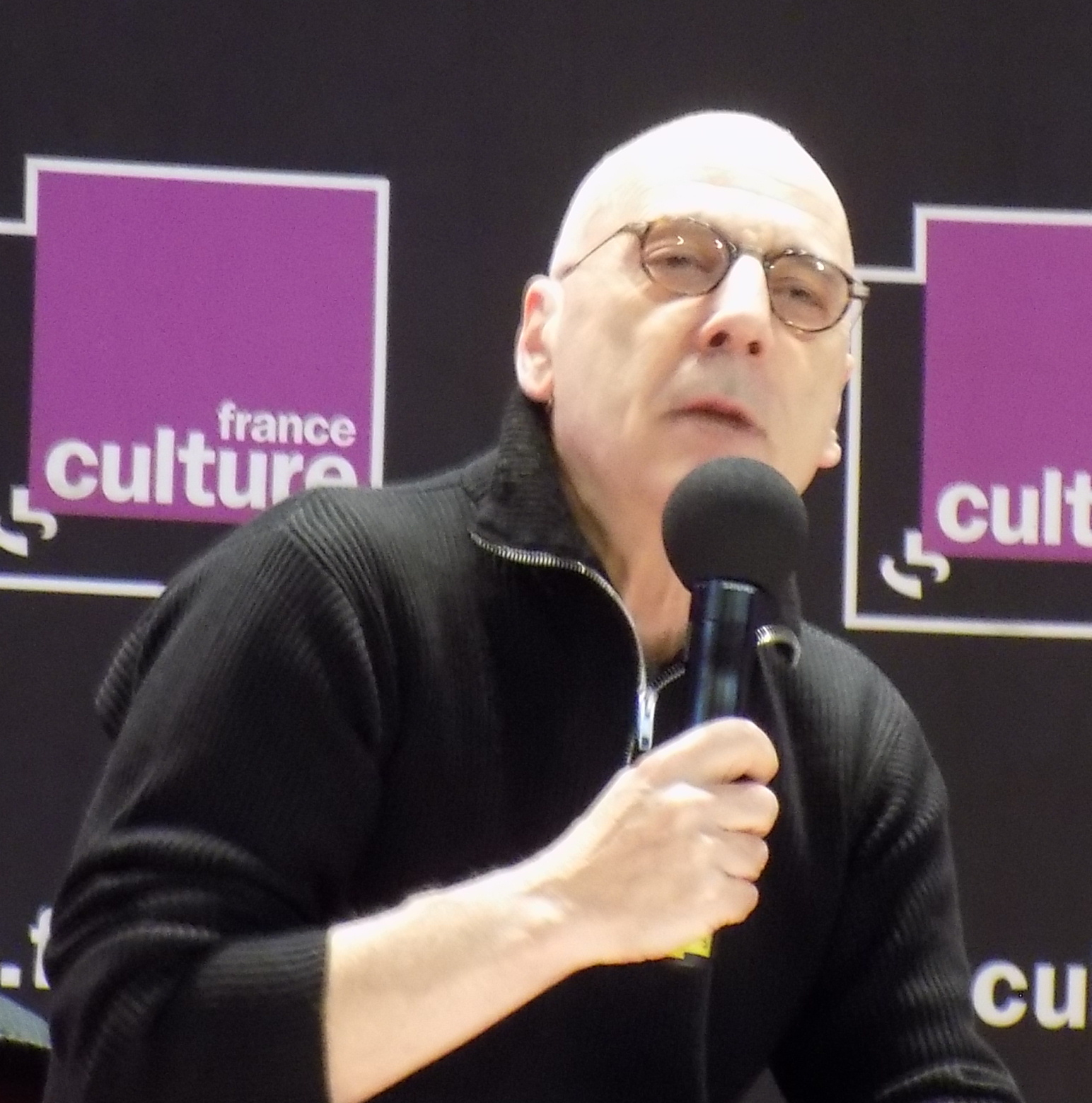 Alain Prochiantz lors du forum « L’année vue par les sciences » organisé par France Culture le 13 février 2016